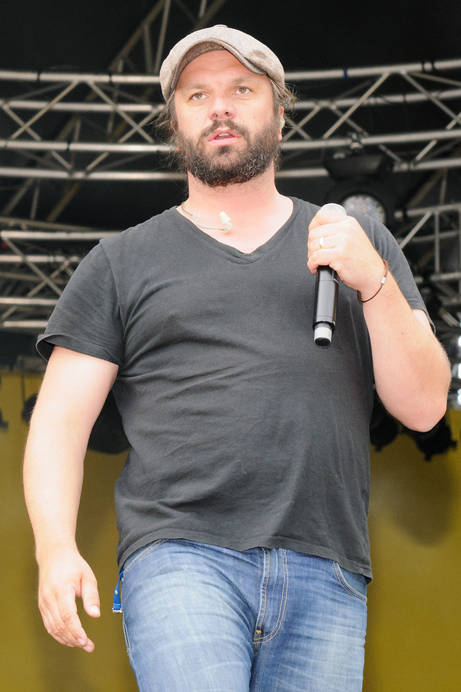 Sänger der Band H-Blockx, Henning Wehland, am 15. Mai 2011 während eines Auftritts der Meisterfeier von Borussia Dortmund (BVB).